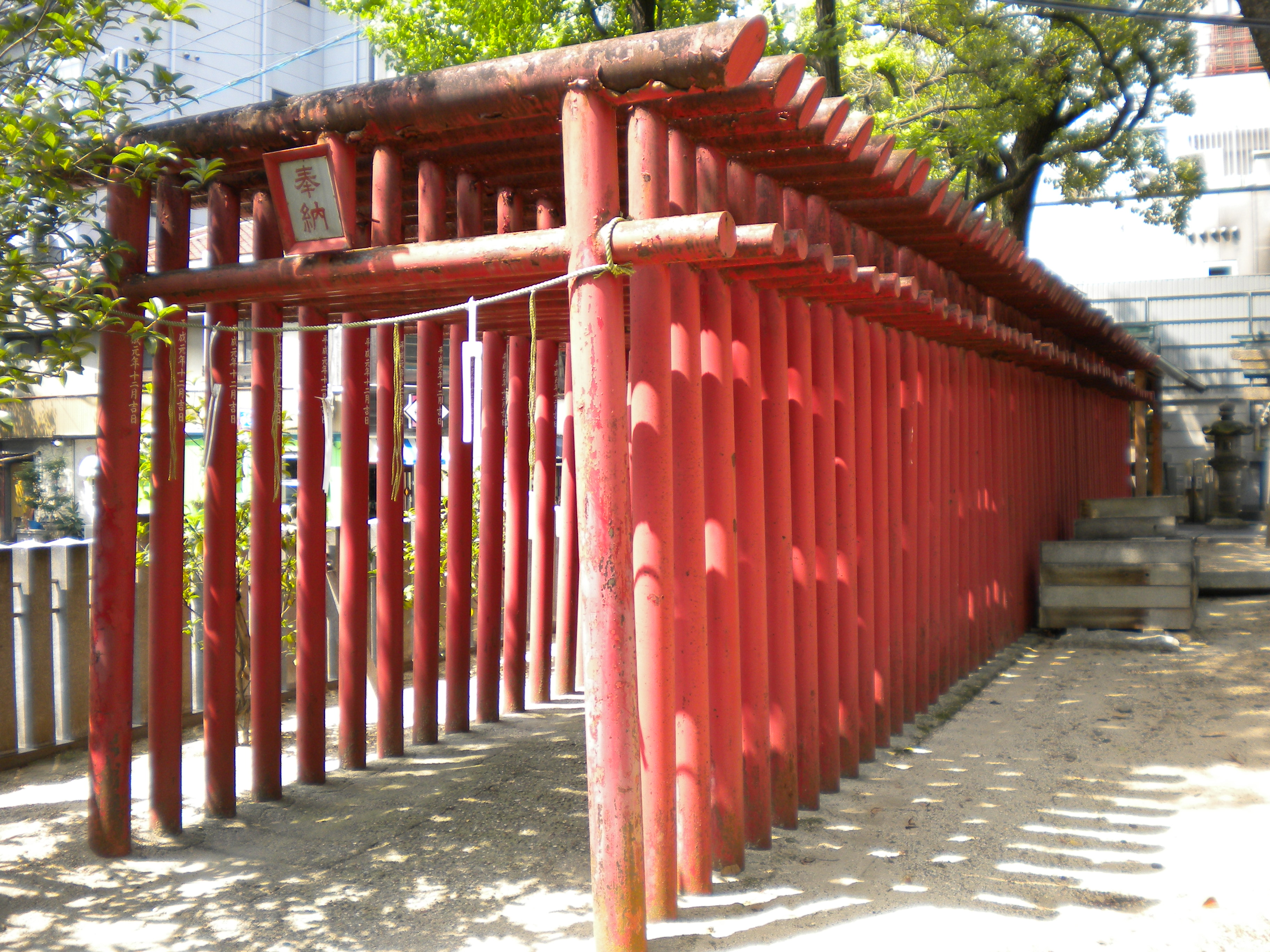 名古屋市千種区の高牟神社